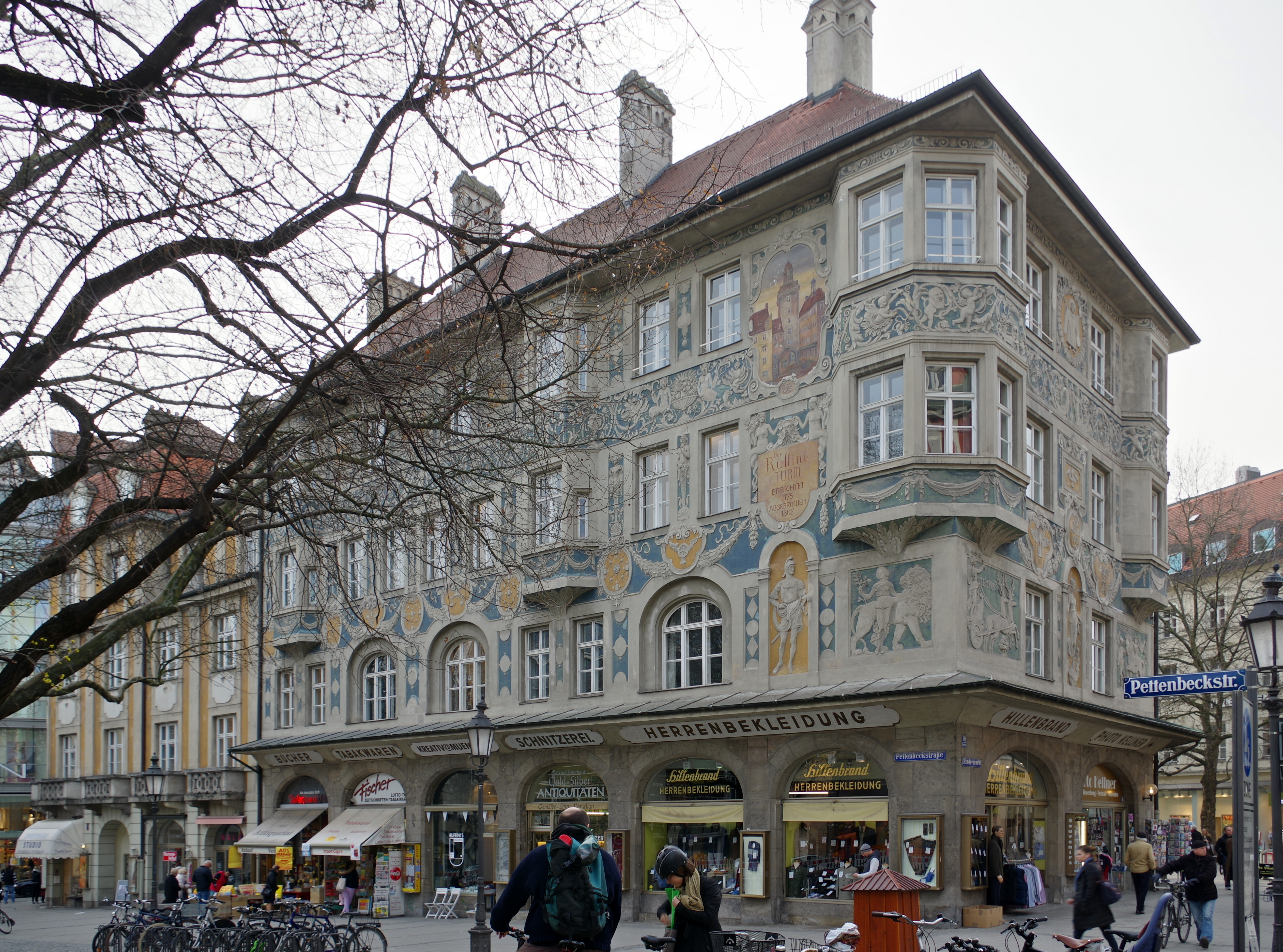 München, Rindermarkt 10, Ruffiniblock; Akten-Nr. D-1-62-000-5846